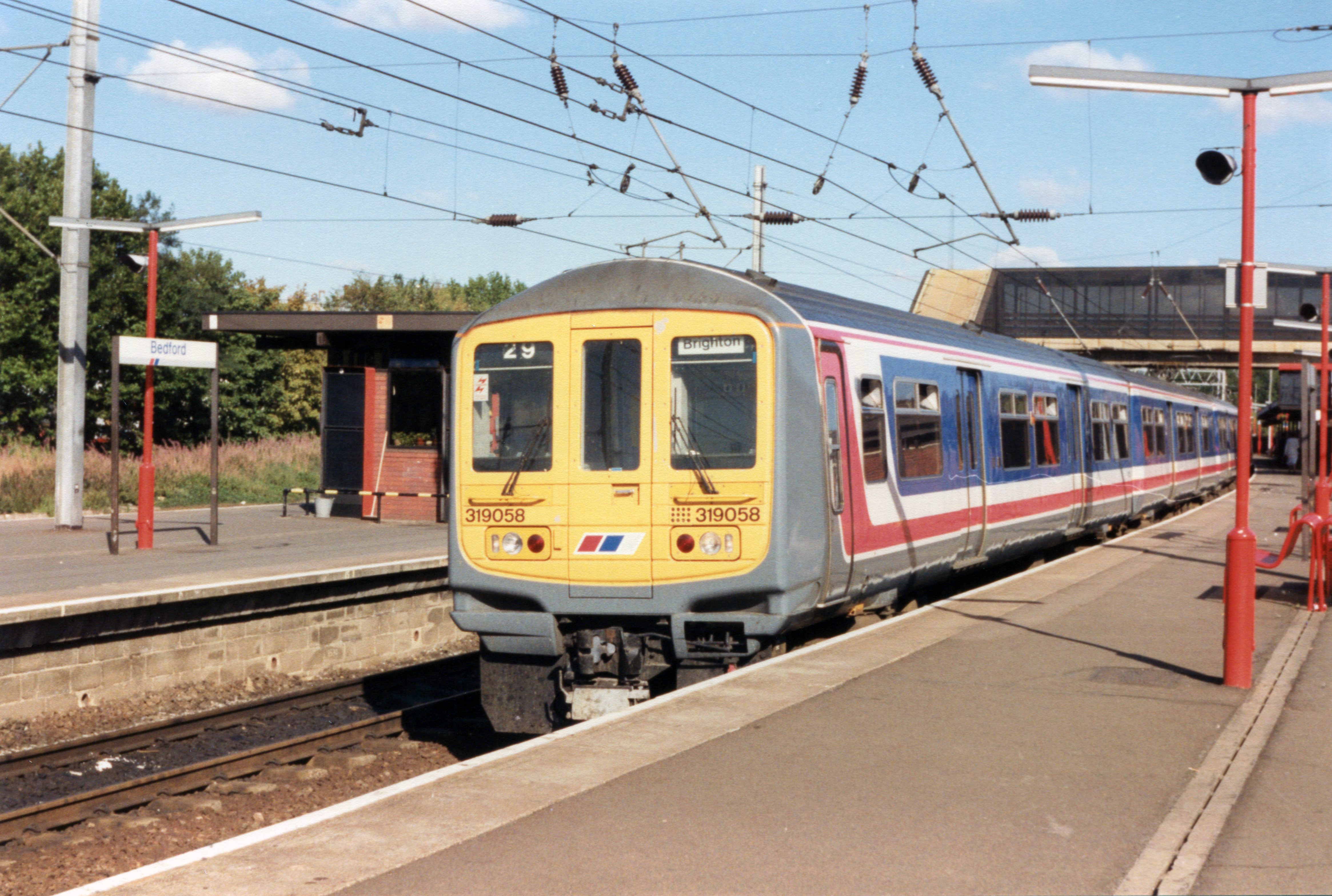 319058 - Bedford